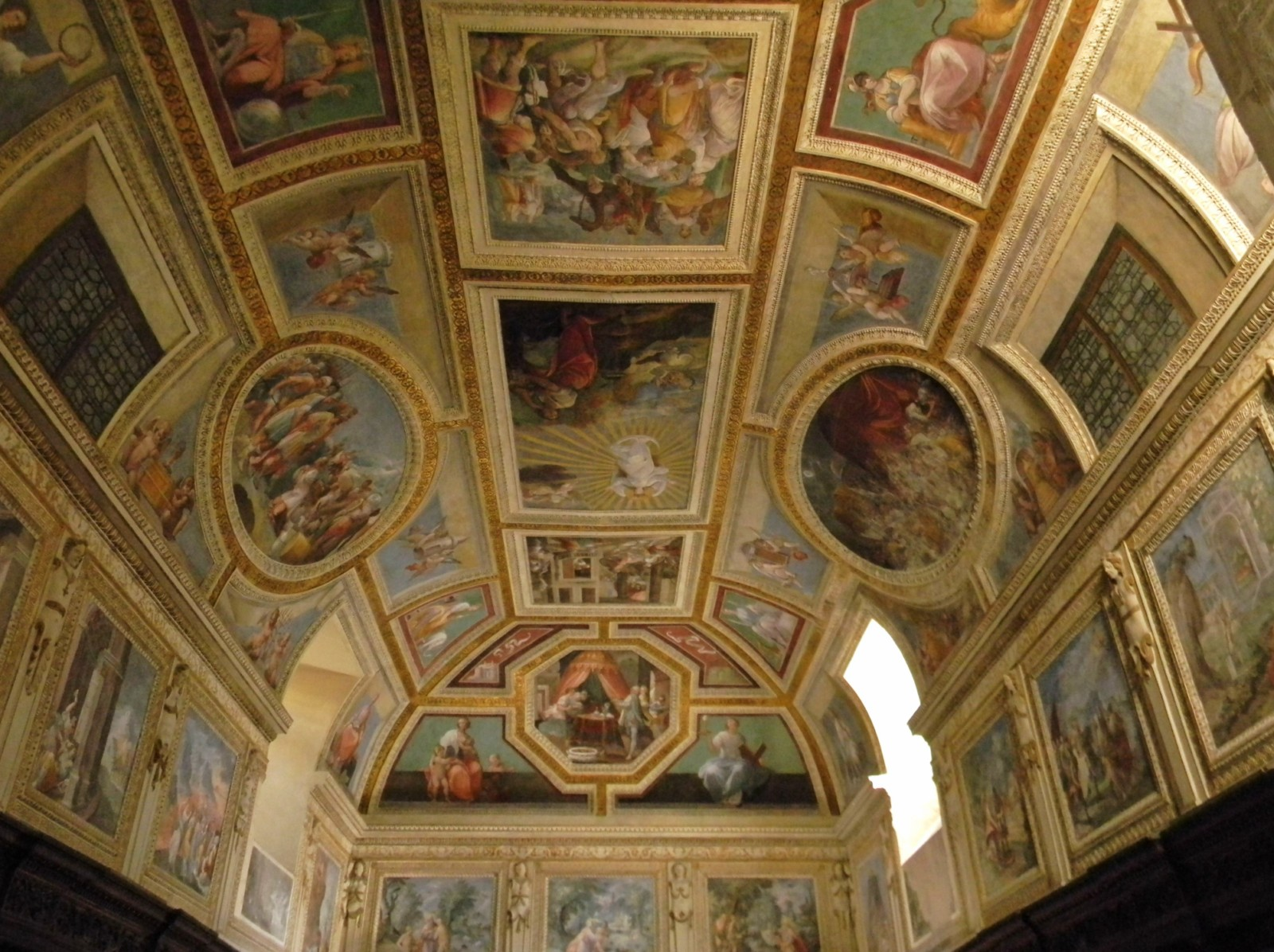 Scene dal Vecchio Testamento. Affreschi di Belisario Corenzio.